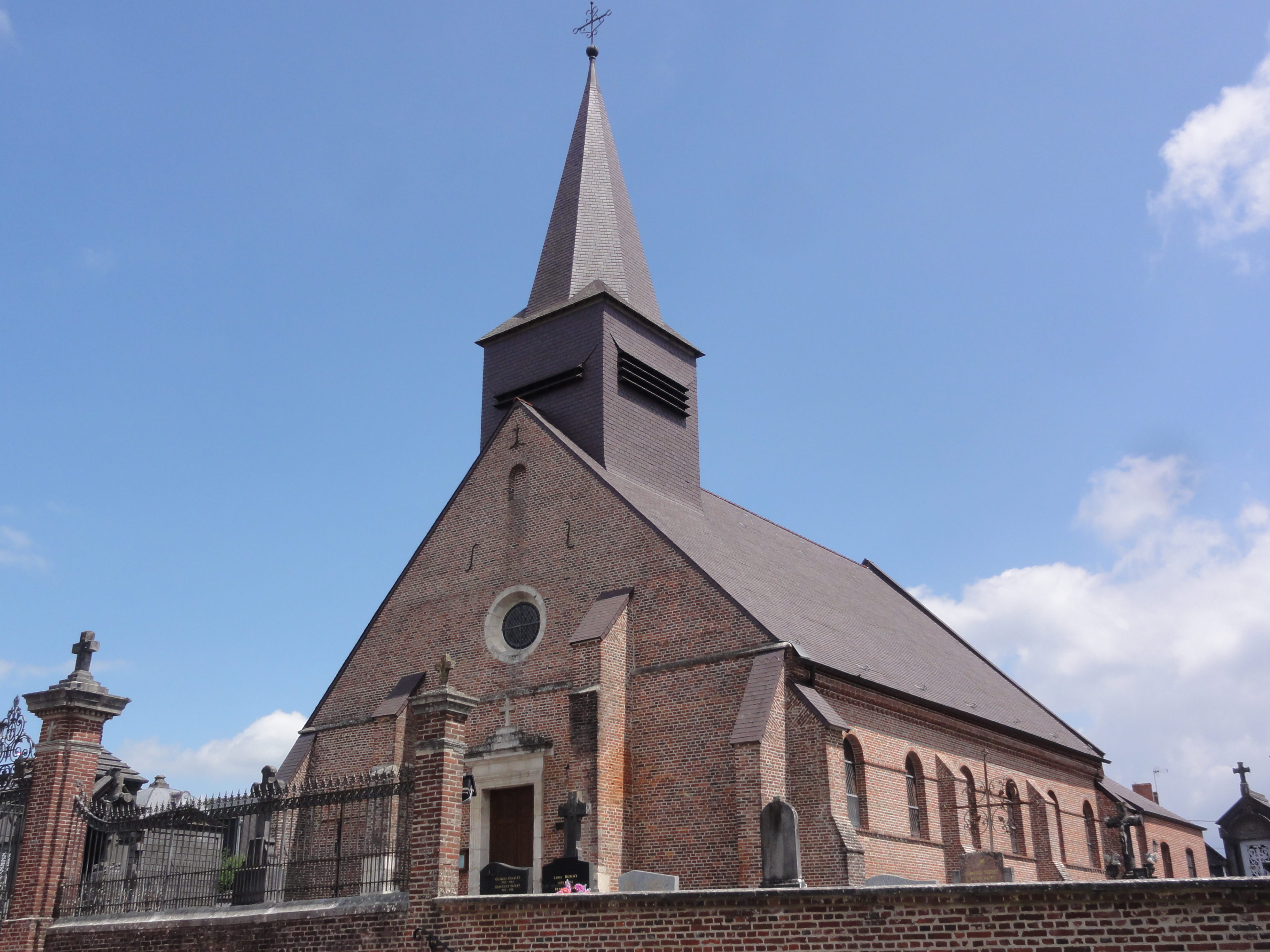 Brunehamel (Aisne) église